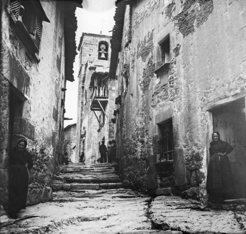 Alpens. Cèsar August Torras i Ferreri (ca. 1910)